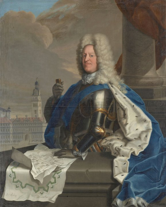 Portrait of Augustus William, Duke of Brunswick-Wolfenbüttel (1662-1731)label QS:Len,"Portrait of Augustus William, Duke of Brunswick-Wolfenbüttel (1662-1731)" label QS:Lde,"Herzog August Wilhelm (Braunschweig-Wolfenbüttel)"